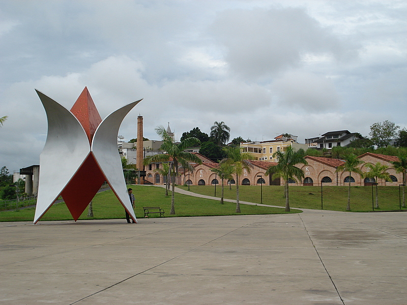 Praça Beira Rio, monumento Guaracui, uma tulipa de aço. Ao fundo, Casarão do Porto conhecido como KKKK , marco da colonização japonesa na cidade de Registro-SP. Nesta praça, onde se encontrava uma árvore guaracuí - Andira anthelmia (Vell.) J.F. Macbr., um dos símbolos do município - foi instalada uma obra também denominada Guaracuí (uma flor estilizada de 7m de altura, em aço) que a artista plástica Tomie Ohtake doou ao município em homenagem aos imigrantes japoneses. Origem do nome do parque: José Mendes governou o Município entre 1973 e 1977 e entre 1993 e 1997.